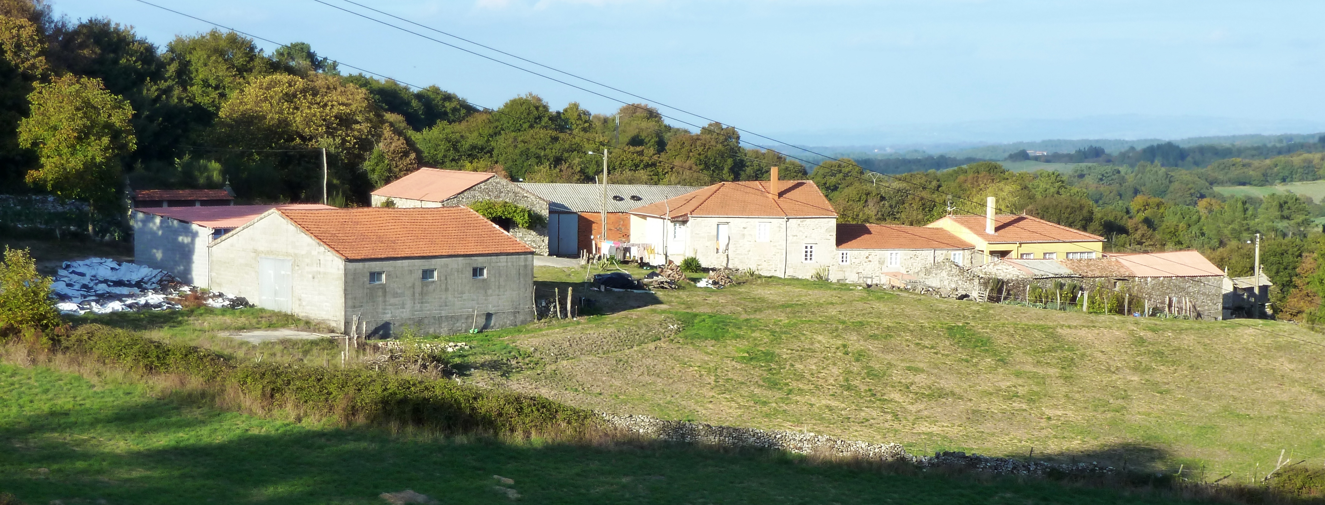 A Eirexeiña, Buciños, Carballedo